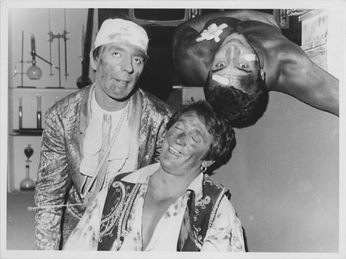 Tristán y otros dos actores en la película El hombre invisible ataca (1967).